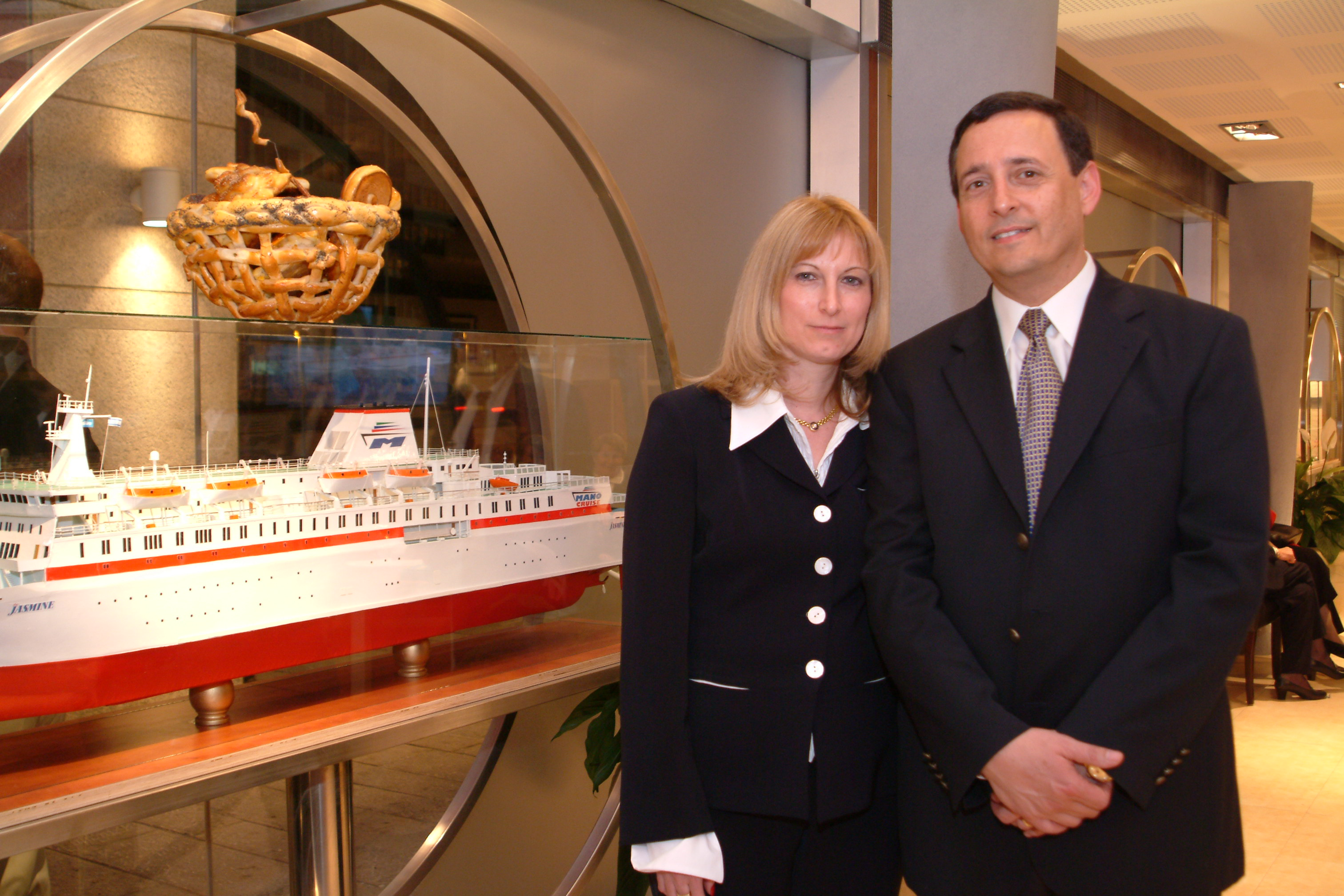 משה מנו ורעייתו איריס